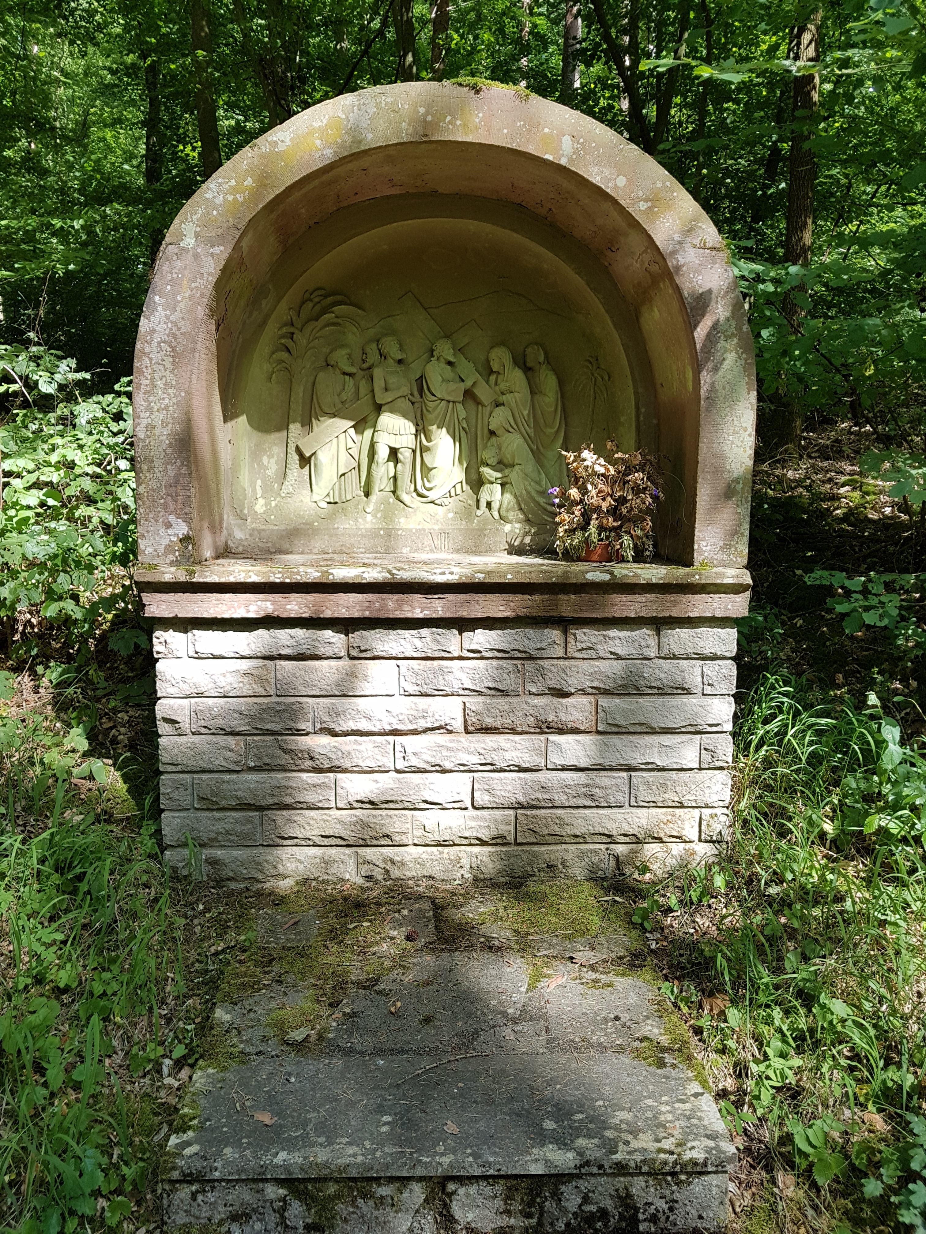 Kreuzweg zur Dittwarer Kreuzkapelle am Kreuzhölzle Bilder hochkant